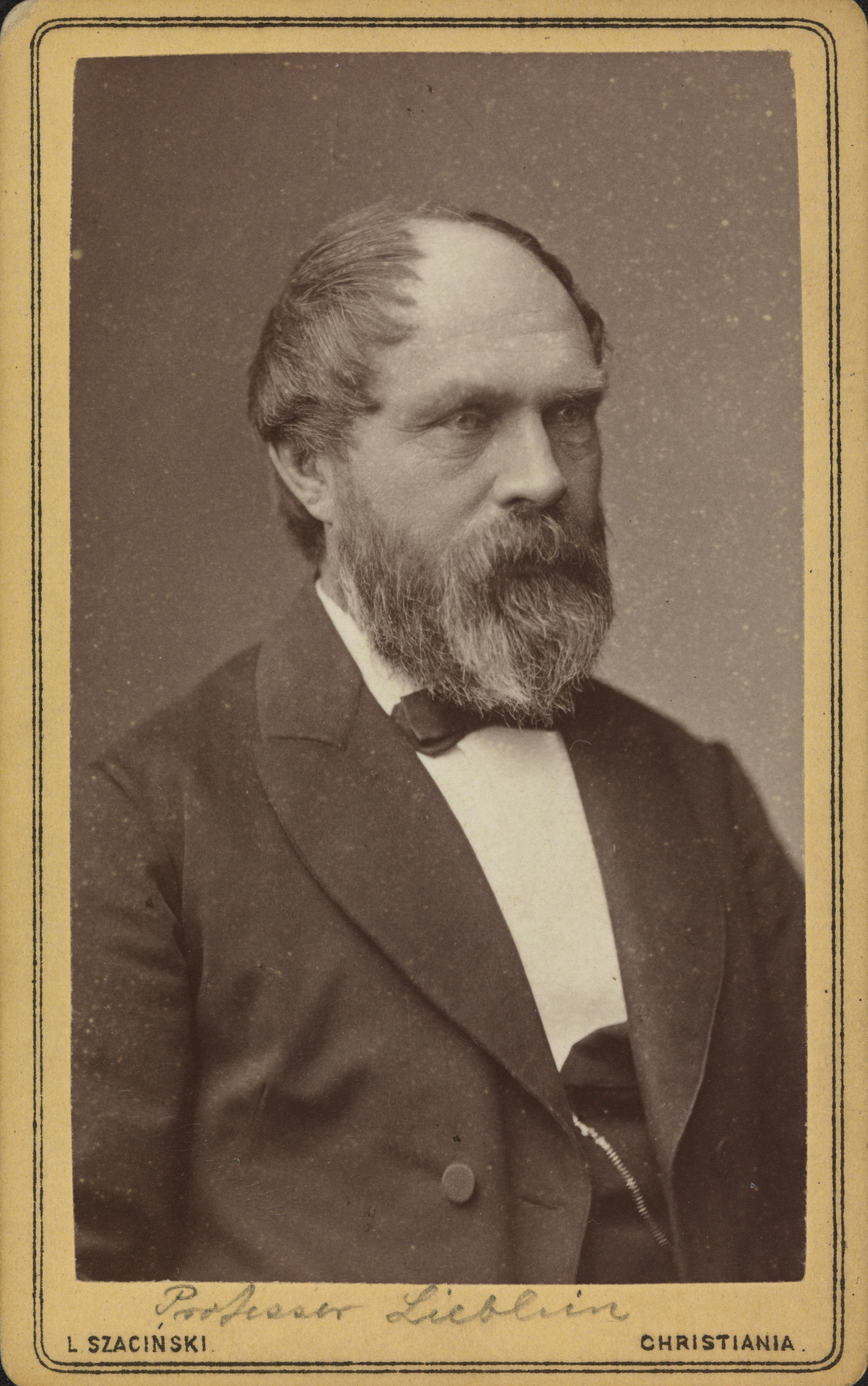 Bildet er hentet fra Nasjonalbibliotekets bildesamling Depicted person: Lieblein, Jens